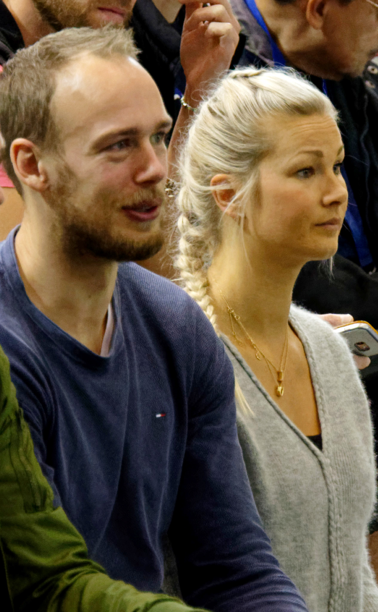 Ulrika Toft Hansen dans les tribunes du match du 3e tour de la Coupe EHF entre Paris 92 et les danoises de Team Esbjerg. A Issy les moulineaux, le 18 novembre 2018.